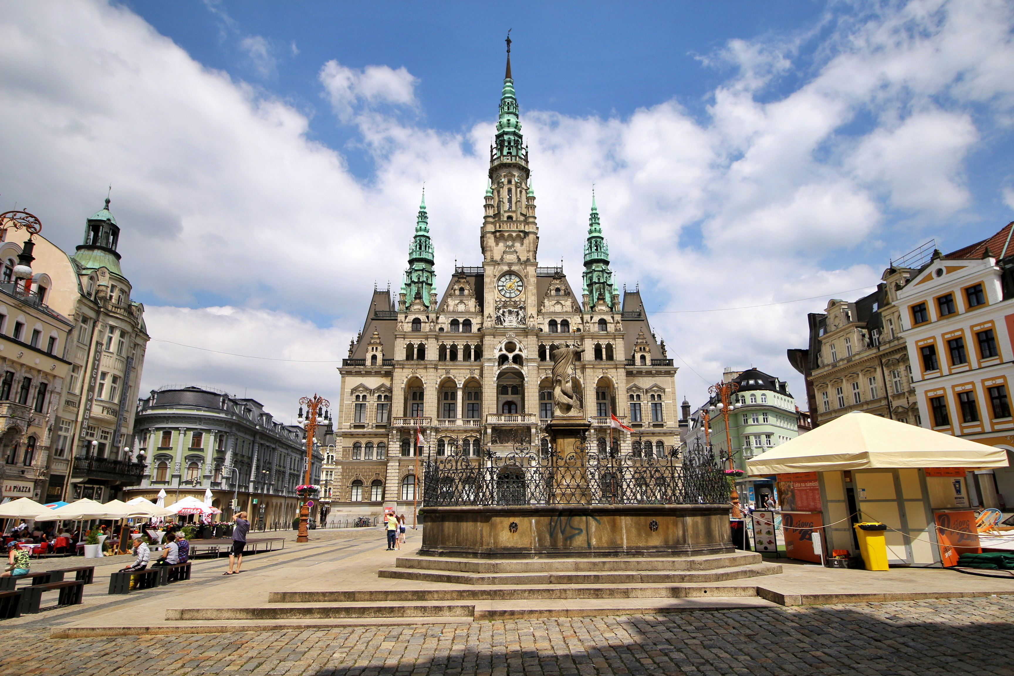 Liberecká radnice